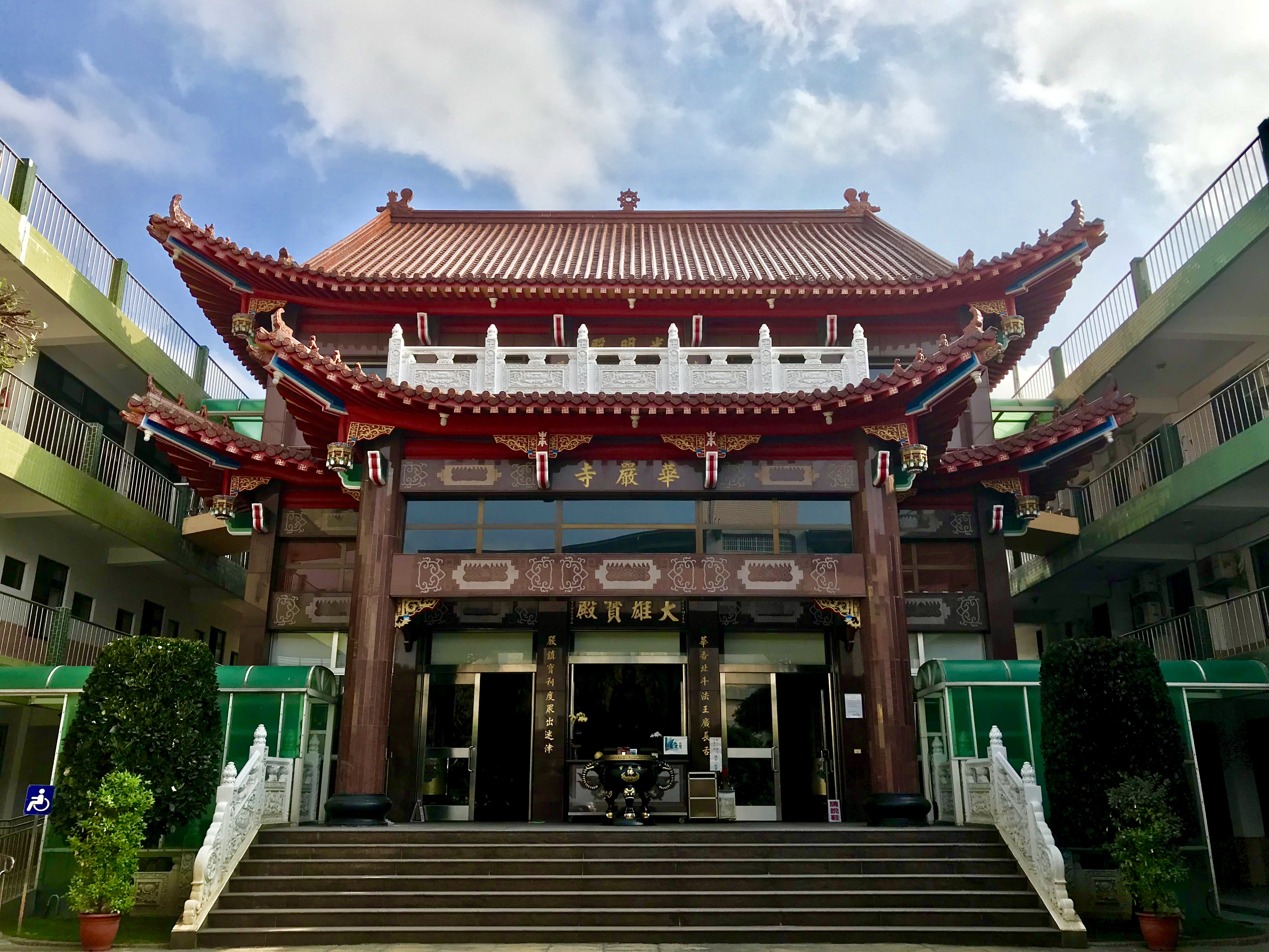 北斗華嚴寺正殿